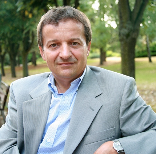 portrait